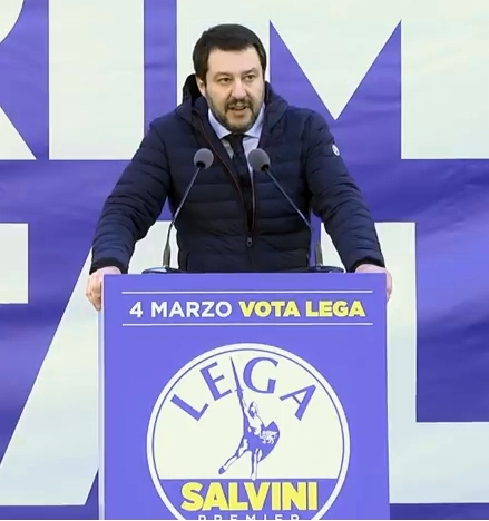 Matteo Salvini - Manifestazione Piazza Duomo - 24 Febbraio 2018